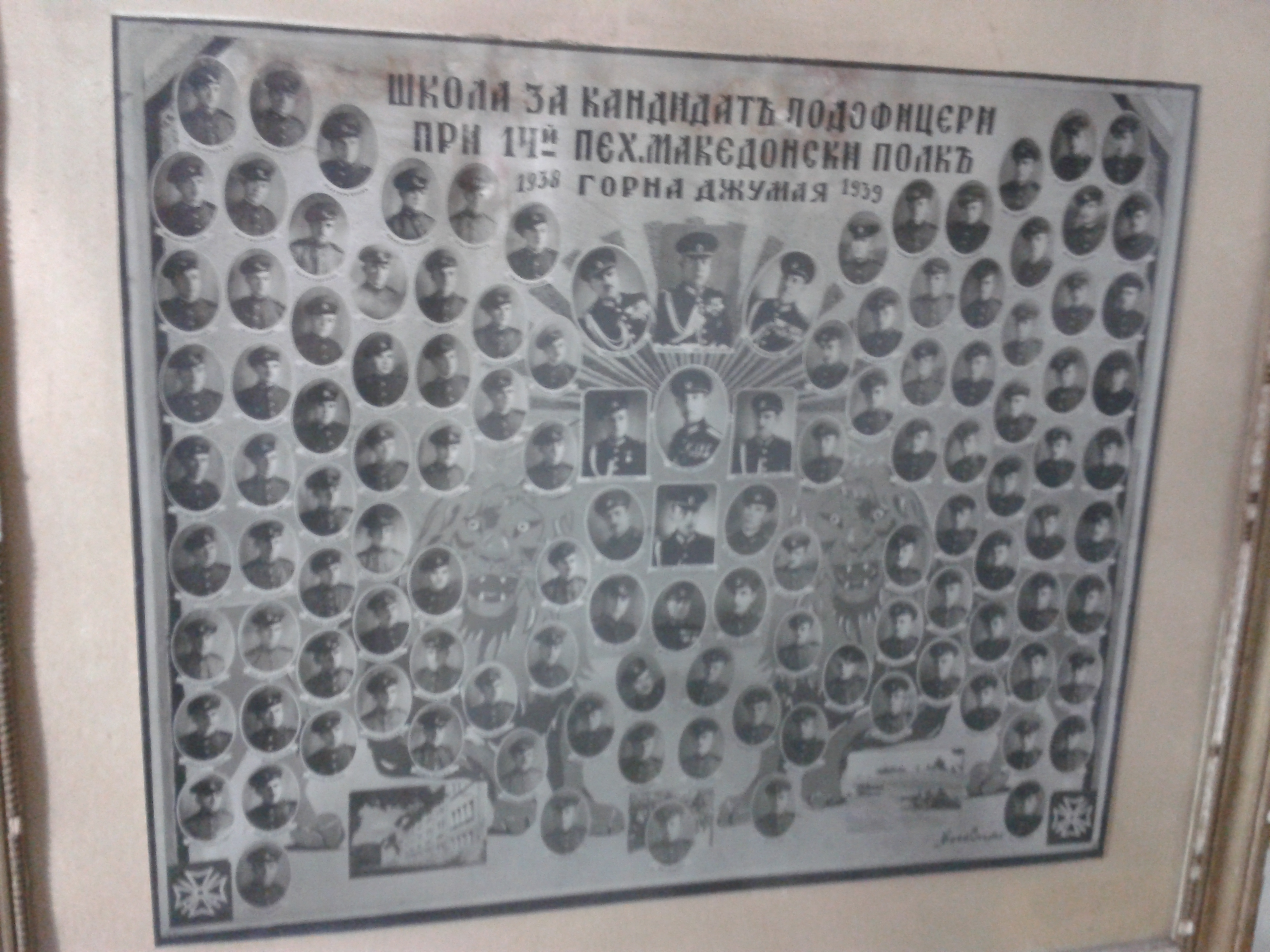 Подофицерската школа на 14 пехотен македонски полк.